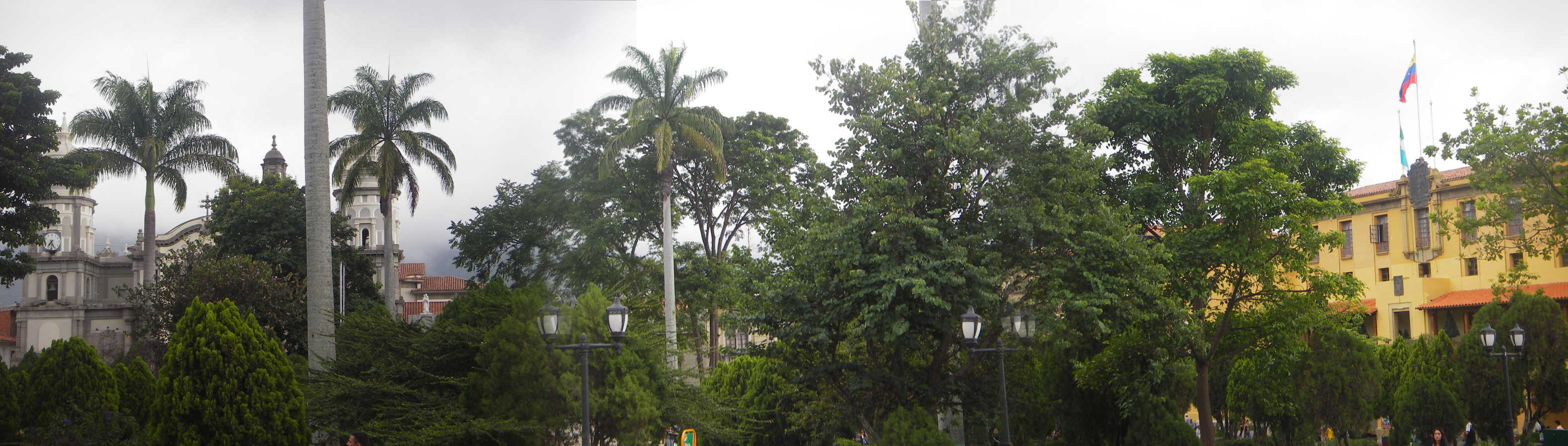 Imagen panorámica de la Plaza Bolívar de la ciudad de Mérida, Venezuela en donde pueden ser apreciados además el palacio de gobierno del estado y la catedral de Mérida. La plaza posee abundante arborización por lo cual es dificil apreciar la calsada o la estatua de Simón Bolívar. Licencia Libre, imagen tomada por Jorge Paparoni, favor nombrar fotógrafo y fuente para enlaces externos.